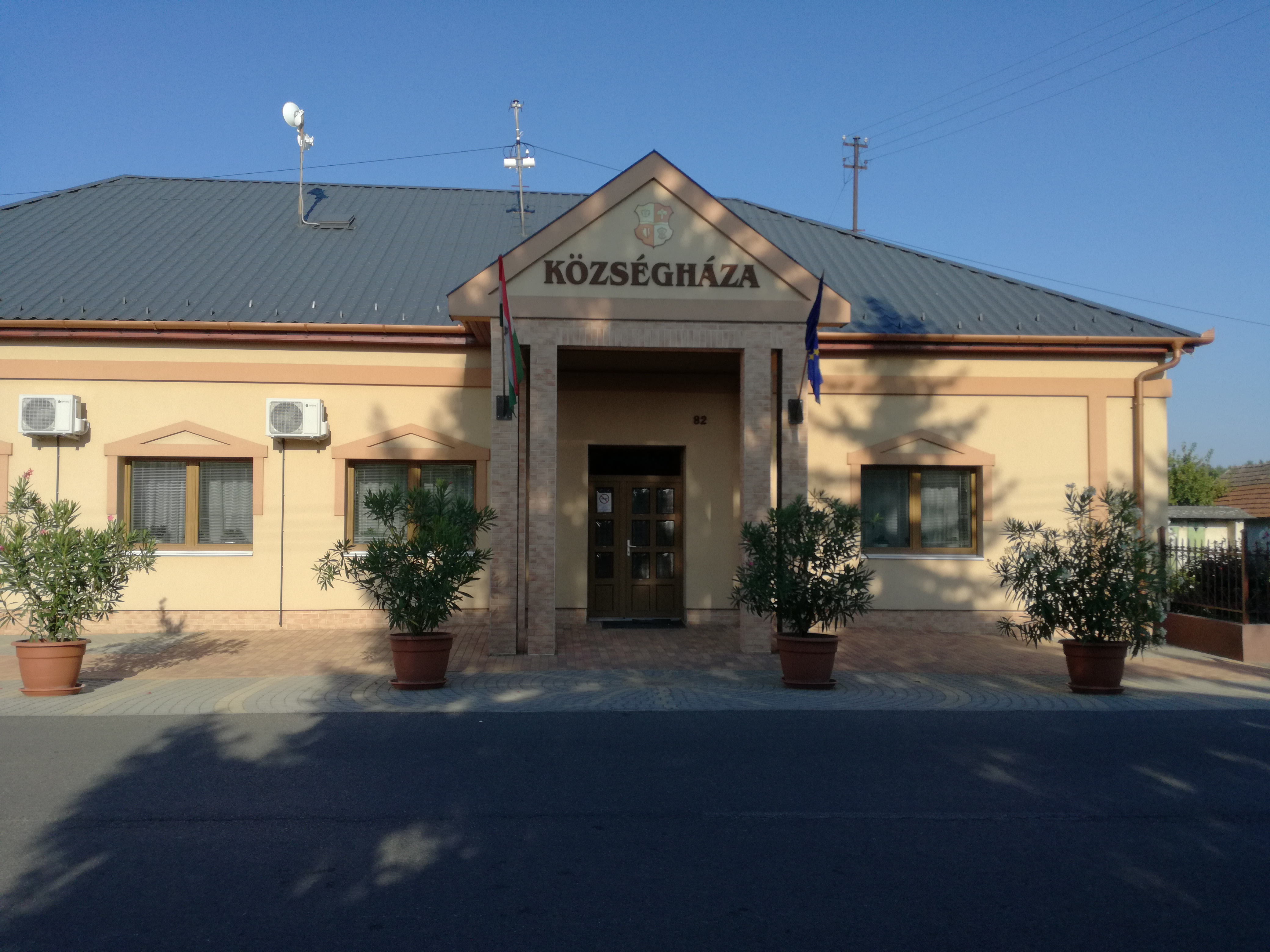 patrohai köszségháza